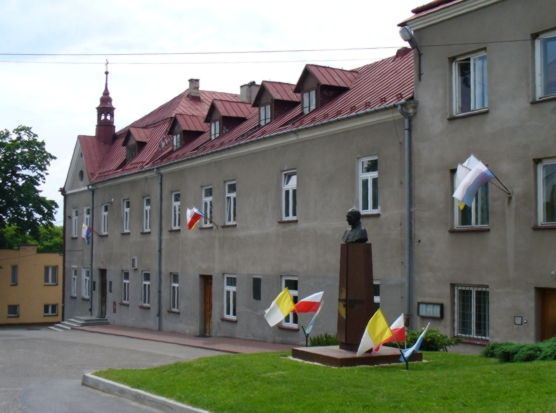 Pawlikowice (województwo małopolskie)